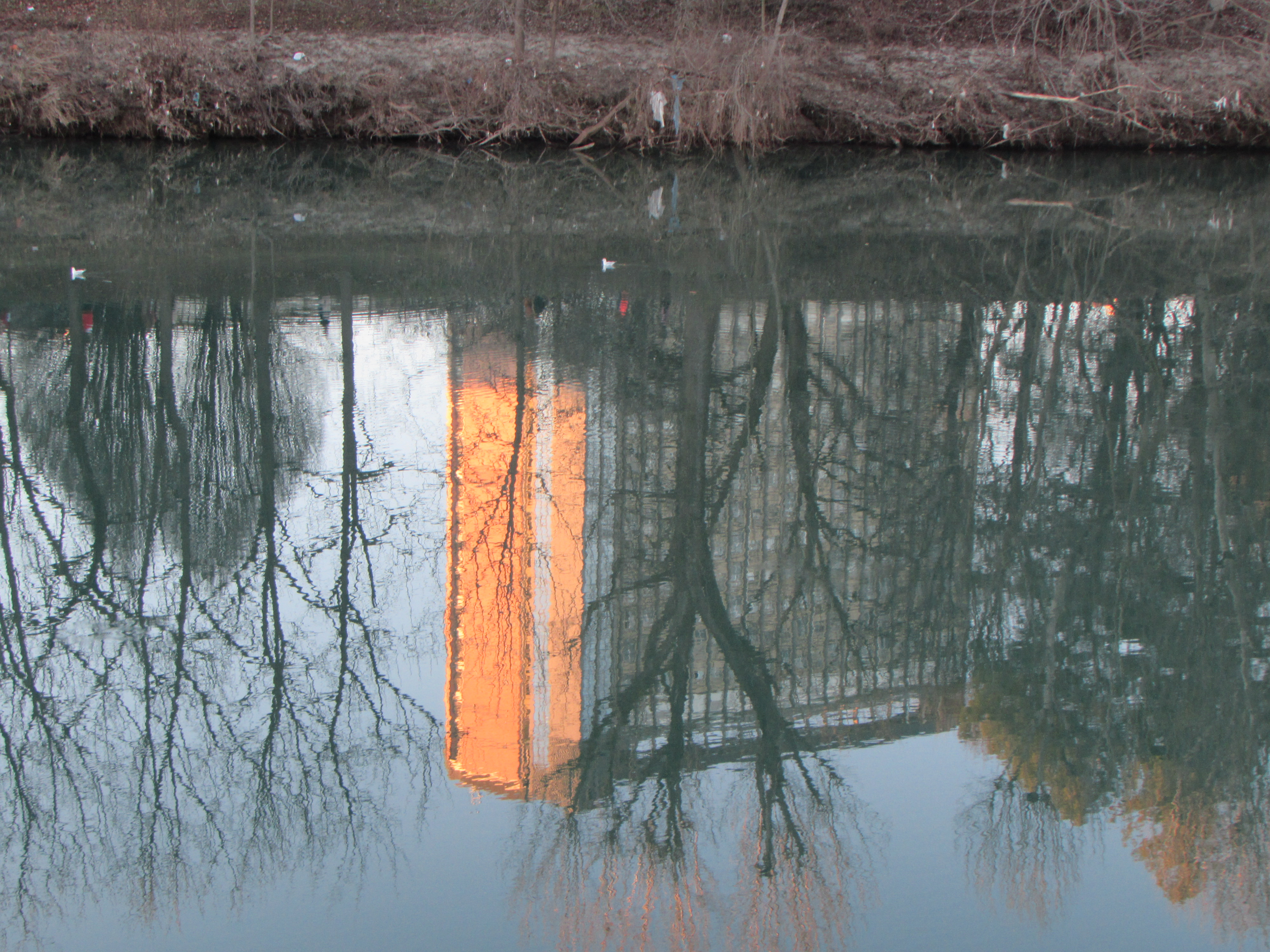 L'Ospedale CTO che si riflette nelle acque del fiume Po